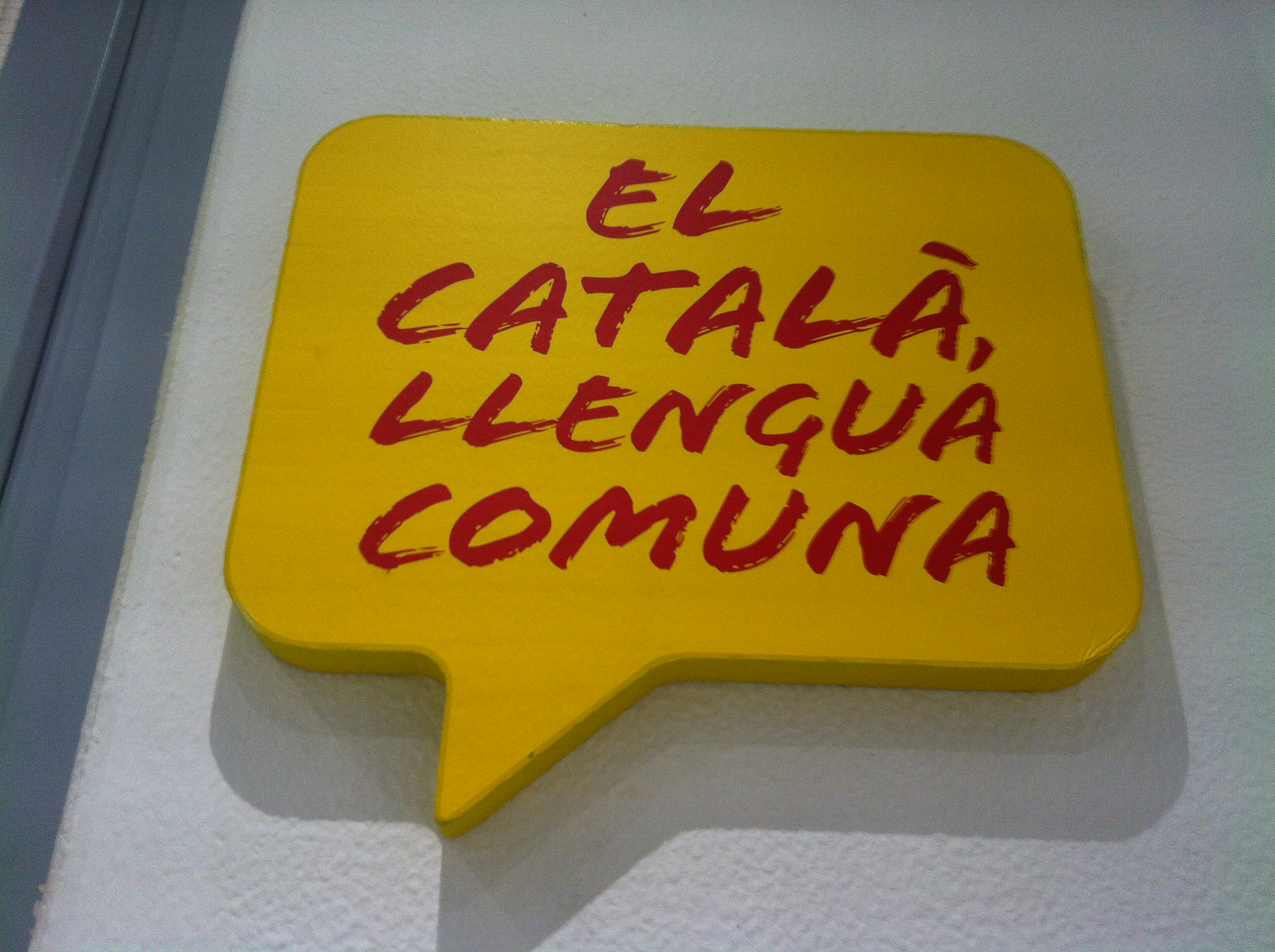 Promoció de Plataforma per la Llengua